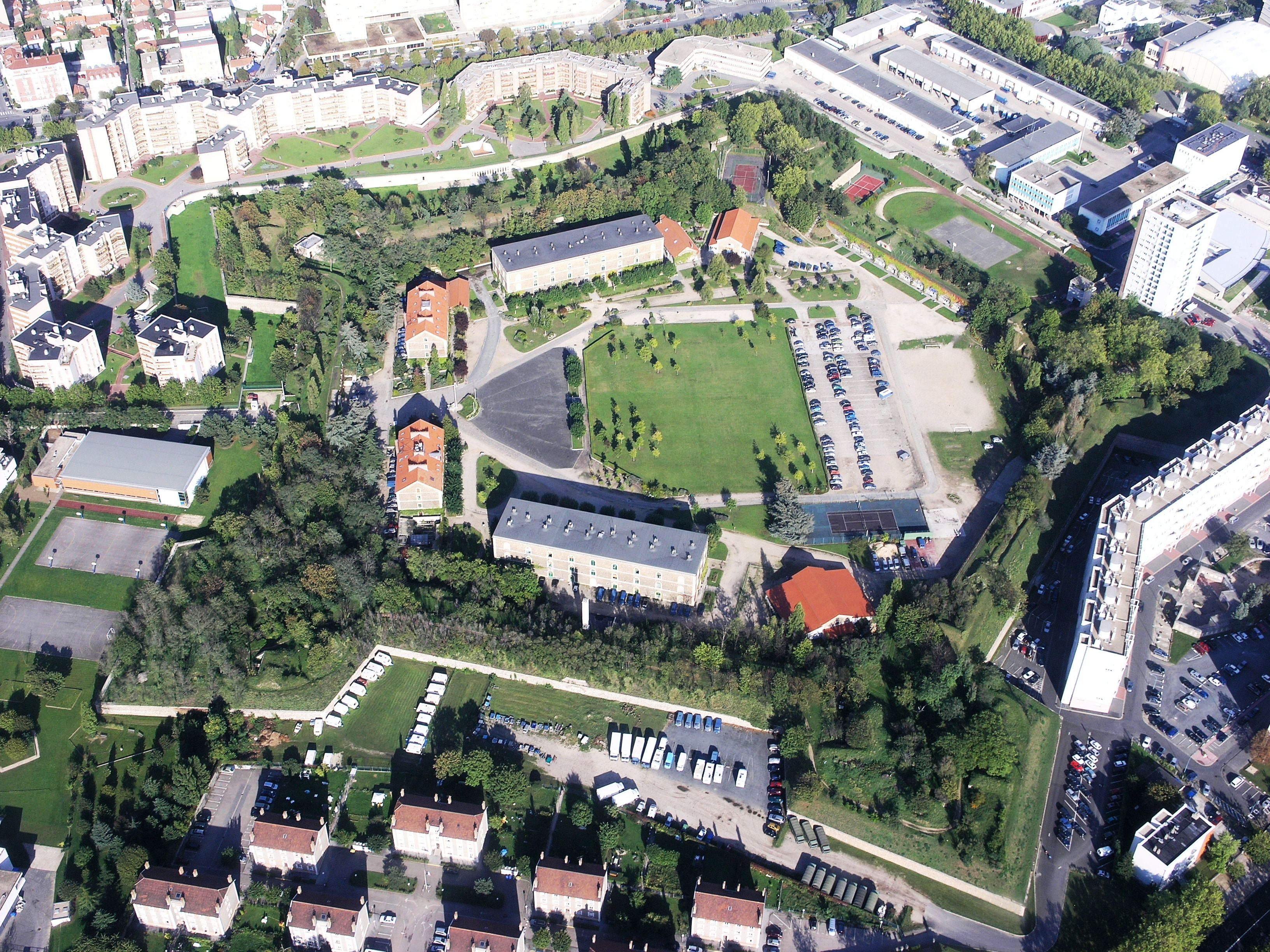 Fort de Charenton à Maisons-Alfort (94)